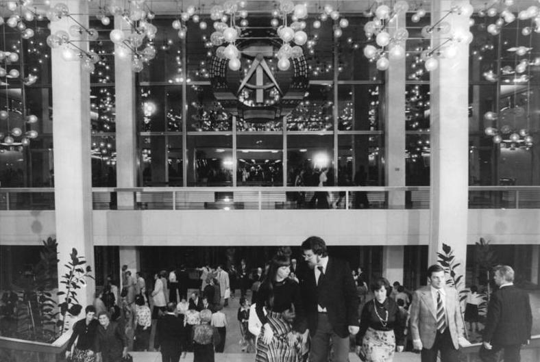 ADN-ZB Link 1.10.76-str-Berlin: Festtage-Festtagsbesucher im Foyer des Palastes der Republik, wo am 1.10. mit einem glanzvollen Konzert die XX. Berliner Festtage eröffnet wurden. Gastspiele von Ensembles und Solisten aus über 20 Ländern, 14 Premieren hauptstädtischer Bühnen und zehn Gastspiele aus den Bezirken der DDR halten die rund 300 Veranstaltungen bis zum 17.10. bereit.